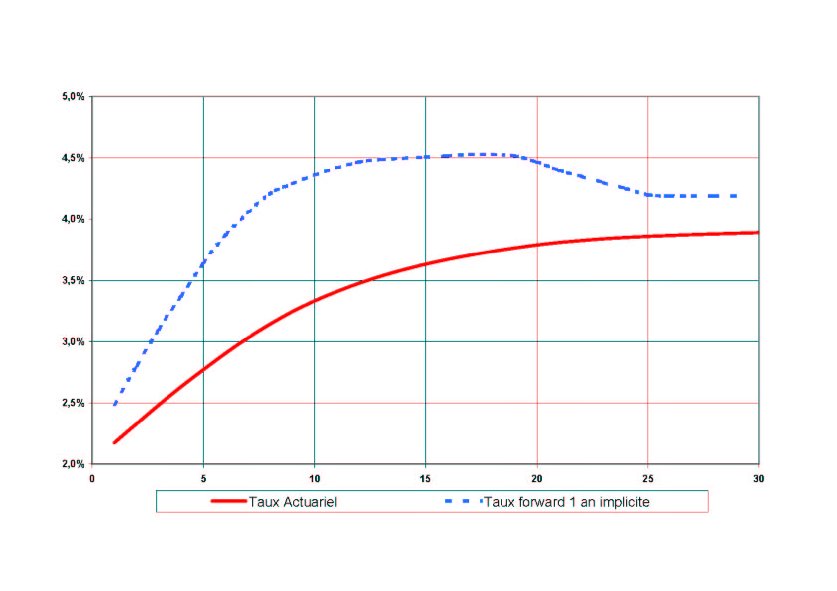 Courbe des taux de swaps en euros le 12 7 2005 à 11h et taux forward 1 an implicites